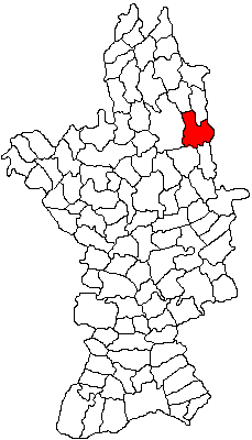 Categorie:Hărţi ale judeţului Olt